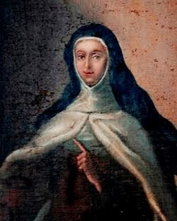 Mère Maria Antonia de Jesus (1700-1760) carmélite espagnole, fondatrice du couvent en Galicie